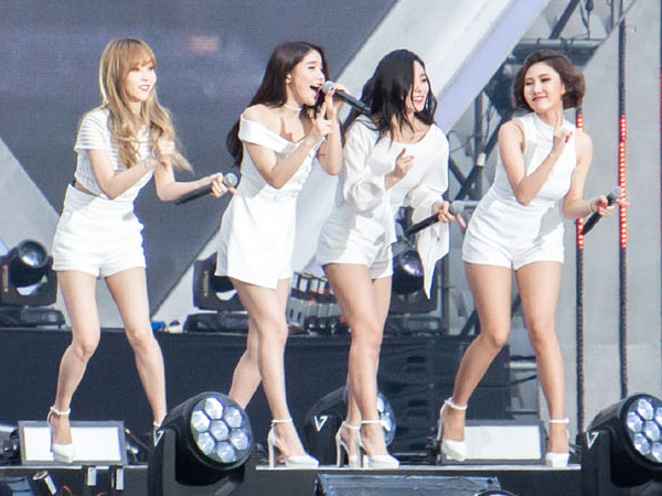 160604 드림콘서트